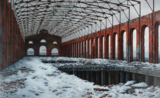 Zinkhütte, Oberschlesien